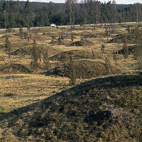 Kånna 24:1. Gravfält. Bilden troligen från slutet av 1960-talet. Kånna 24:1